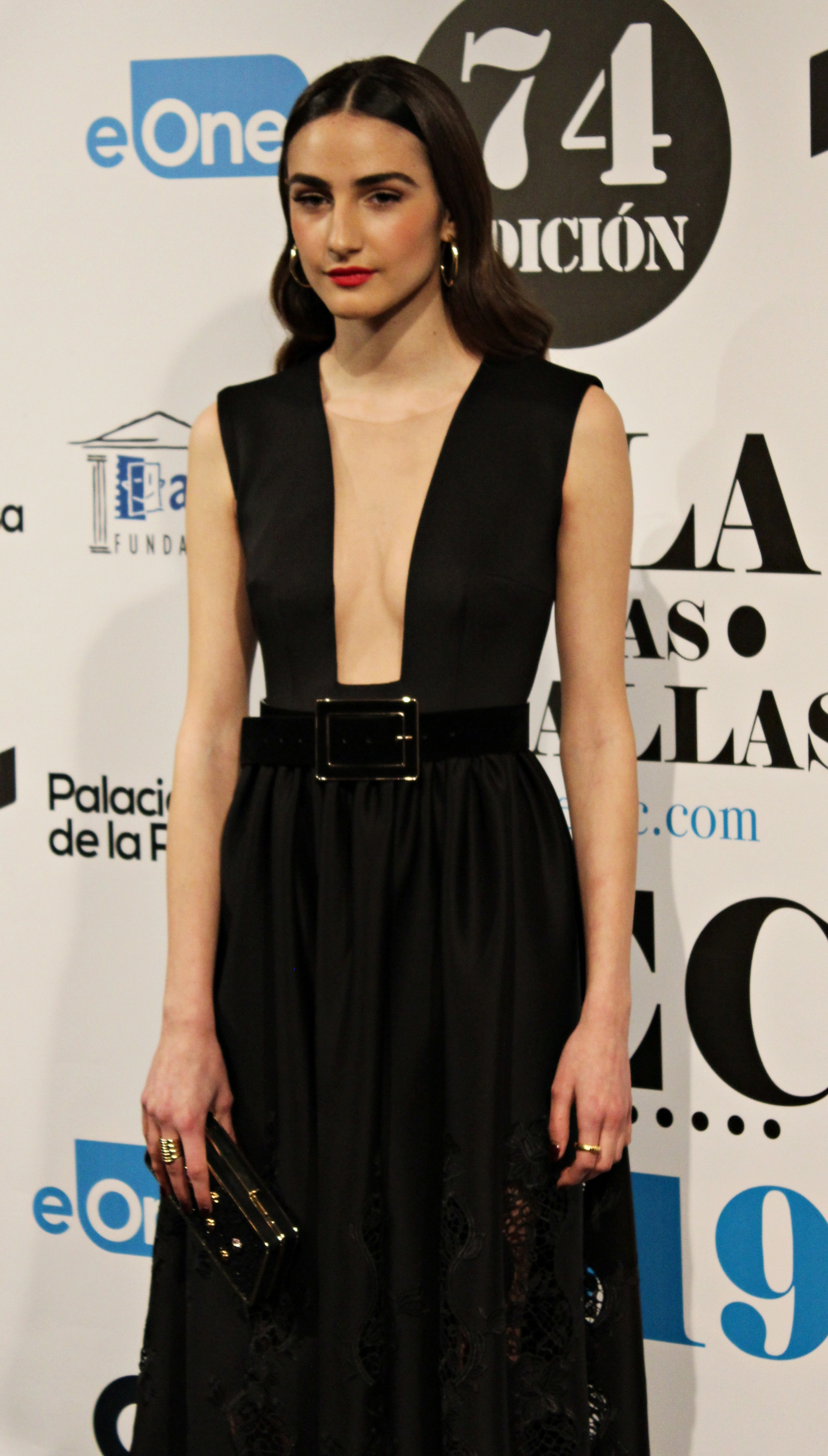 La actriz española Sandra Escacena en la 74 edición de las Medallas del Círculo de Escritores Cinematográficos, en la que actuó como presentadora.